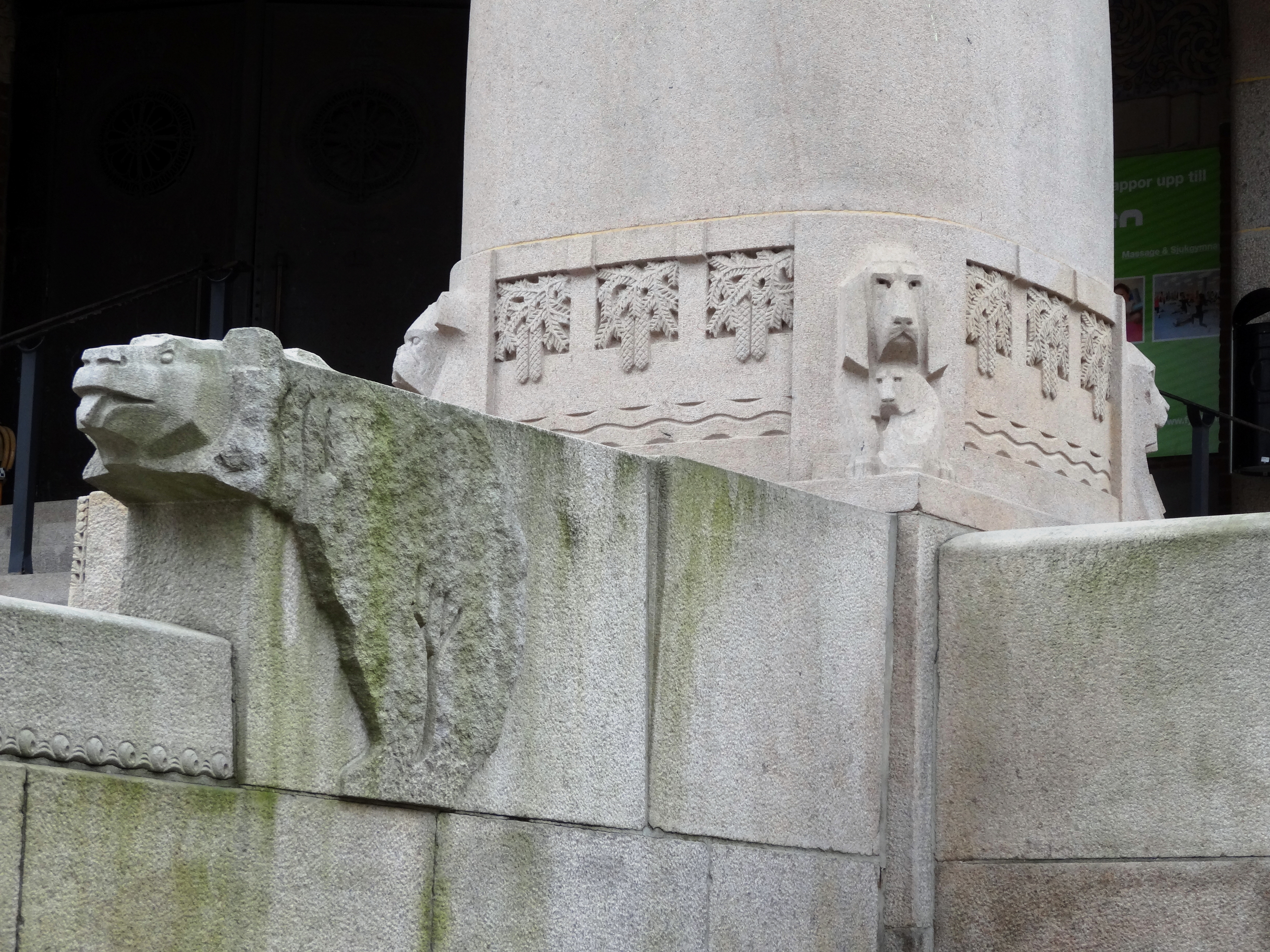 Televerkets hus i Göteborg, detalj av den konstnärliga utsmyckningen: "Två björnar av skulptören Carl Fagerberg - inhuggna i trappans sidor hör till den konstnärliga utsmyckningen, samt hundhuvuden på den kraftiga hörnpelaren." (Televerkets hus, Göteborg)